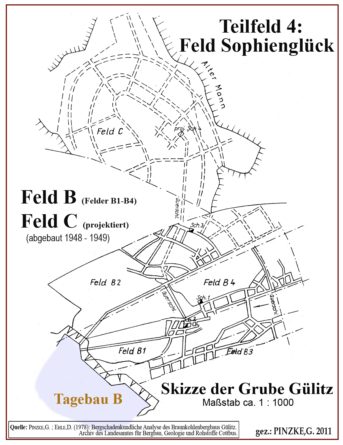 Lage des Tagebaus B sowie der Abbaufelder B und C